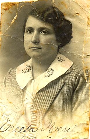 moglie di Urbano Salvolini